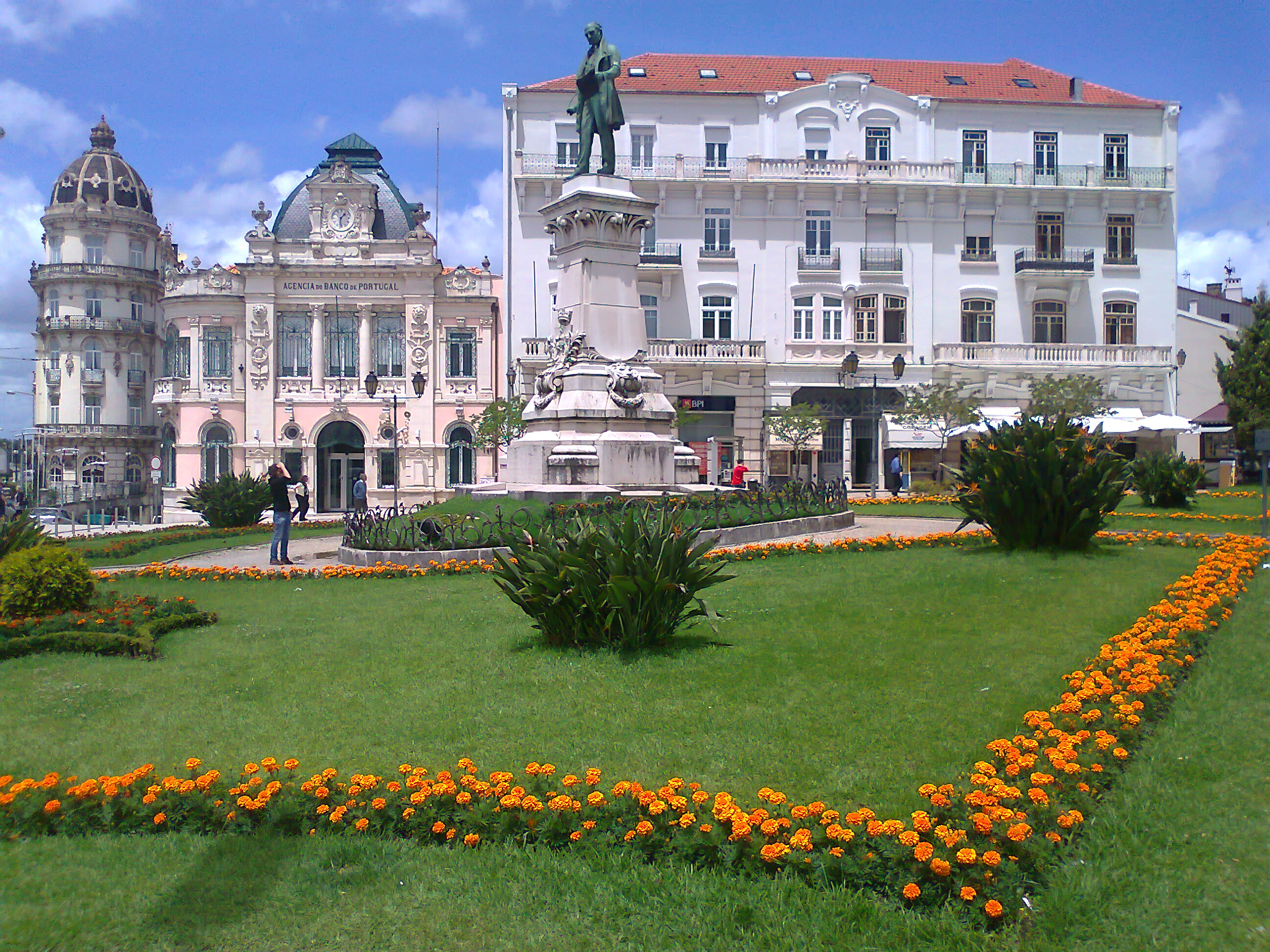 Largo da Portagem Coimbra